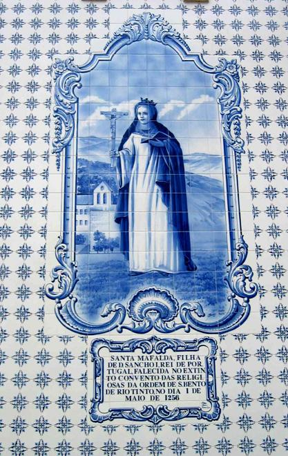 Azulejo - Igreja de Rio Tinto - Gondomar - Portugal